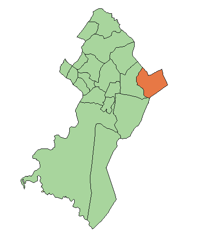 Ubicación de Ypacaraí.